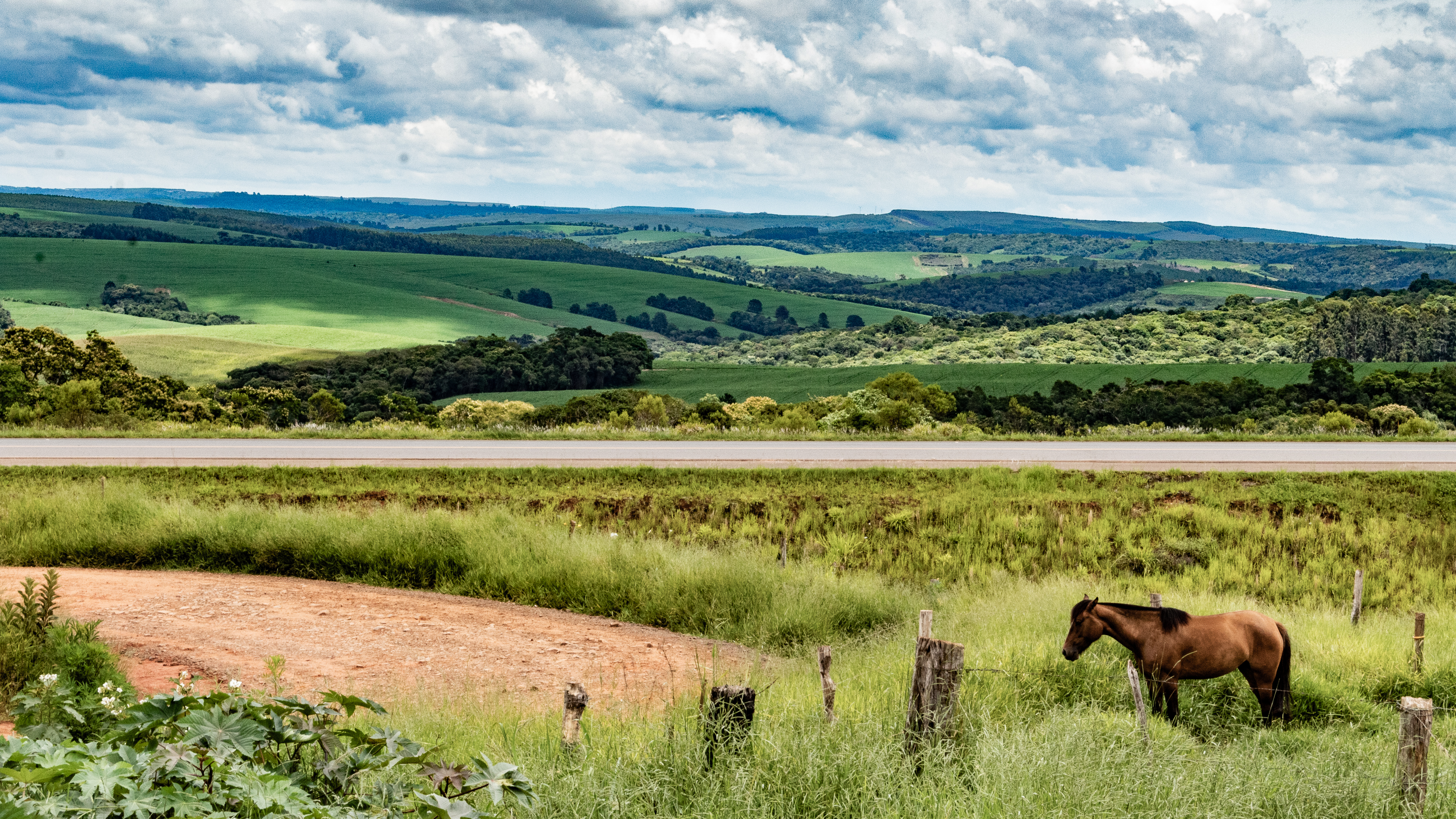 Ventania é cortada pela BR-153 e conta com muitas paisagens rurais, como fazendas, rios e cachoeiras.